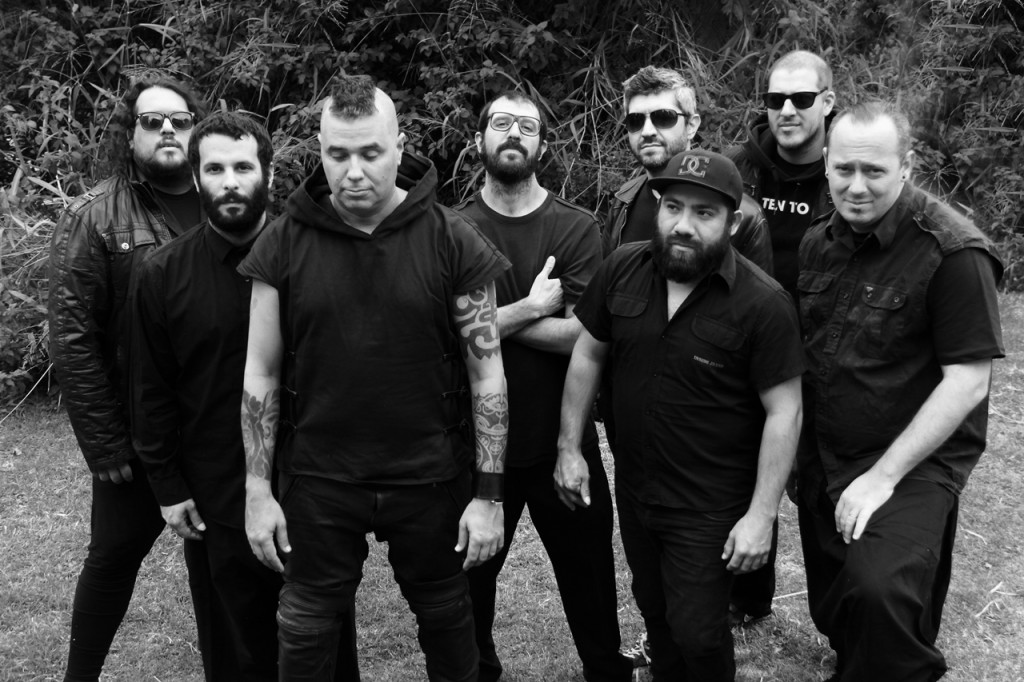 Carmina Burana durante la filmación de su video clip Estrella Blanca